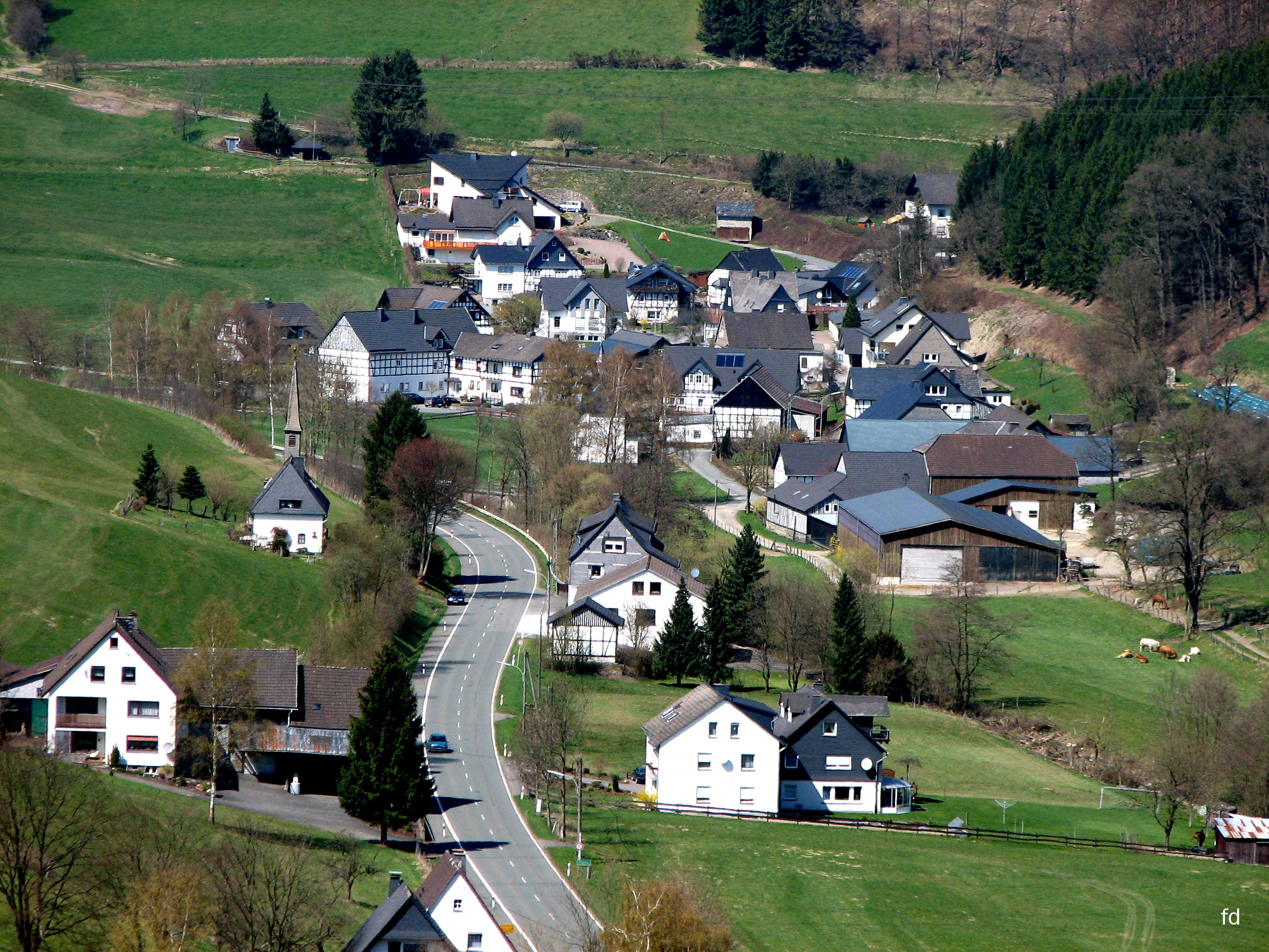 Schmallenberg- Sögtrop, ehemalige evangelische Kapelle (Mitte links)